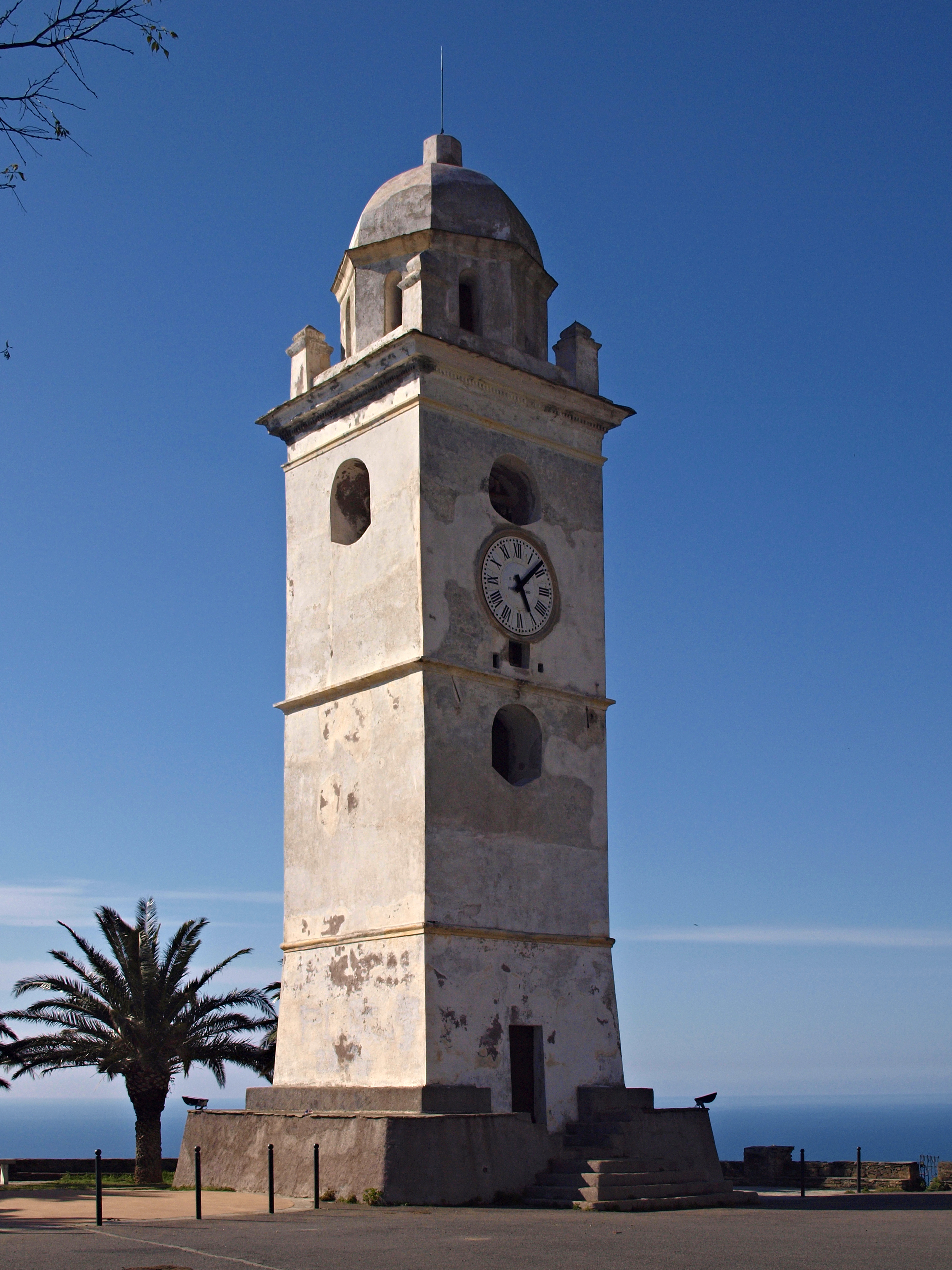 Canari (Corsica) - Le Campanile, emblême de Canari